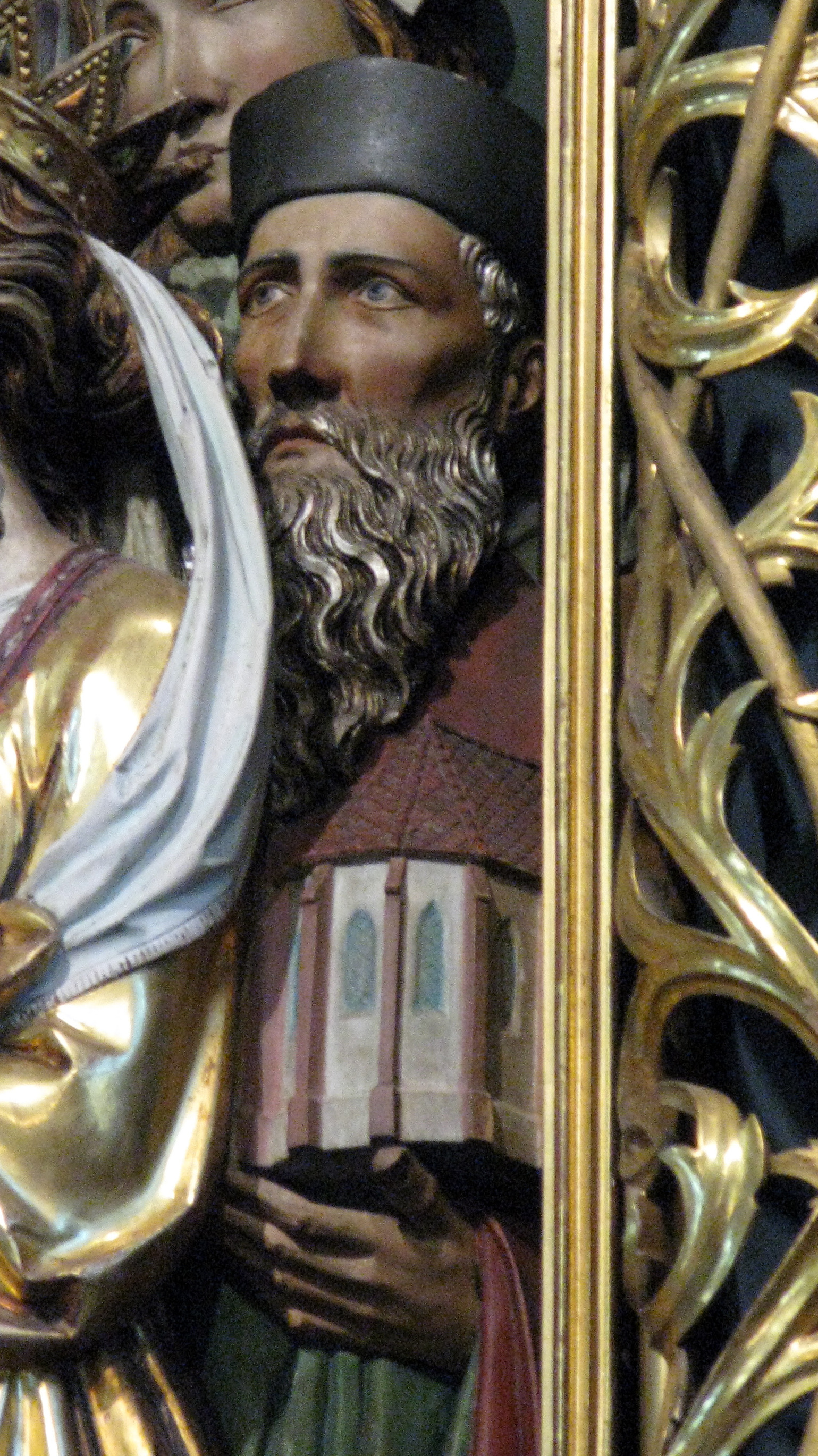 Max Meckel (rechts mit Kirchenmodell in der Hand), Darstellung im rechten Seitenaltar des Münster St. Jakobus in Neustadt (Titisee-Neustadt)